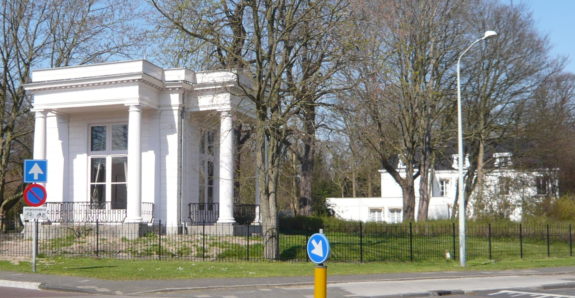 Theekoepel Wildhoef, Kennemerweg, Bloemendaal. In 1784 heeft de Haarlemse koopman Willem Philip Kops de hofstede gekocht en voegde daarbij een bos, boerderij, en theekoepel.